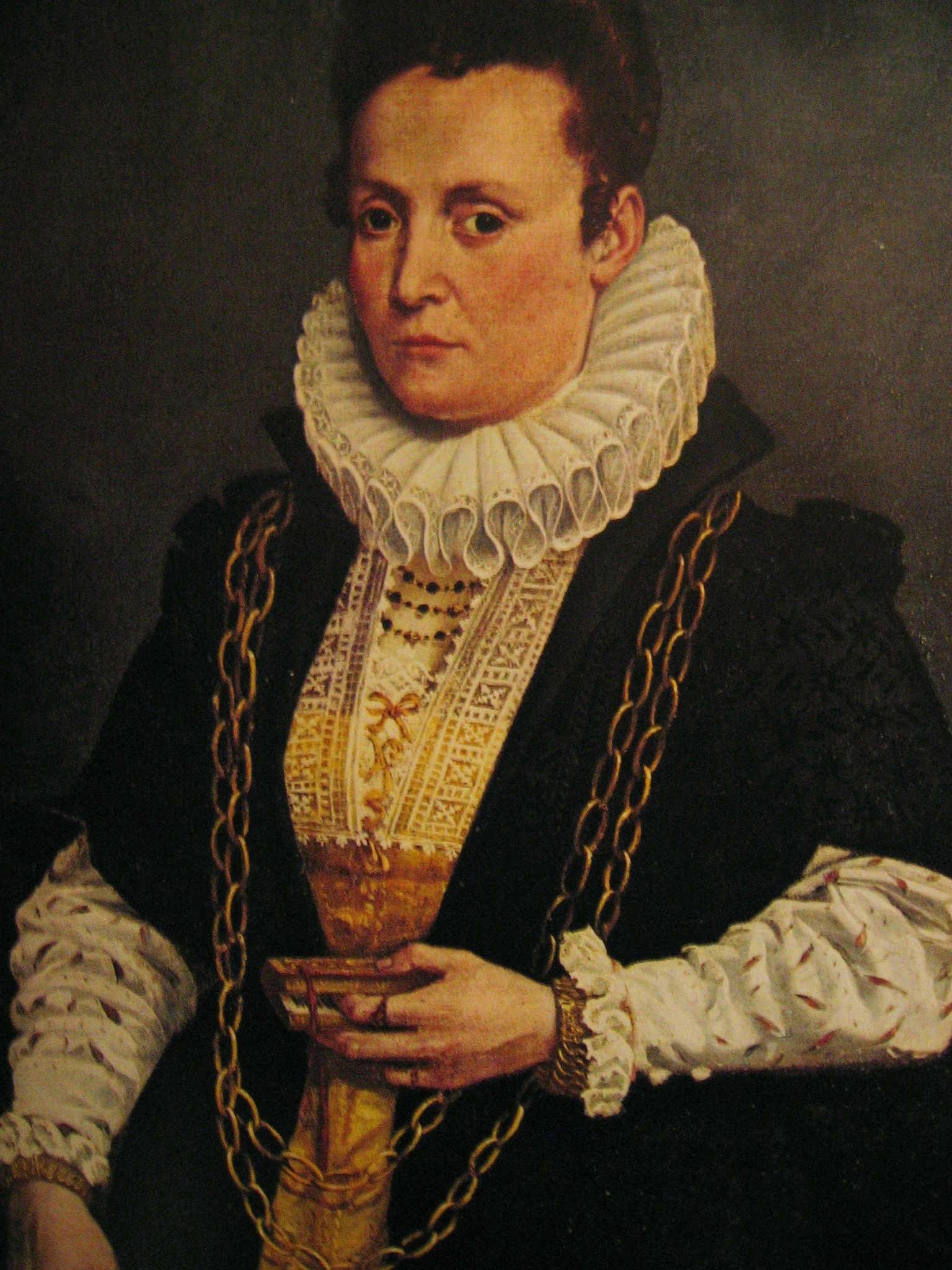 Ritratto di signora con libro